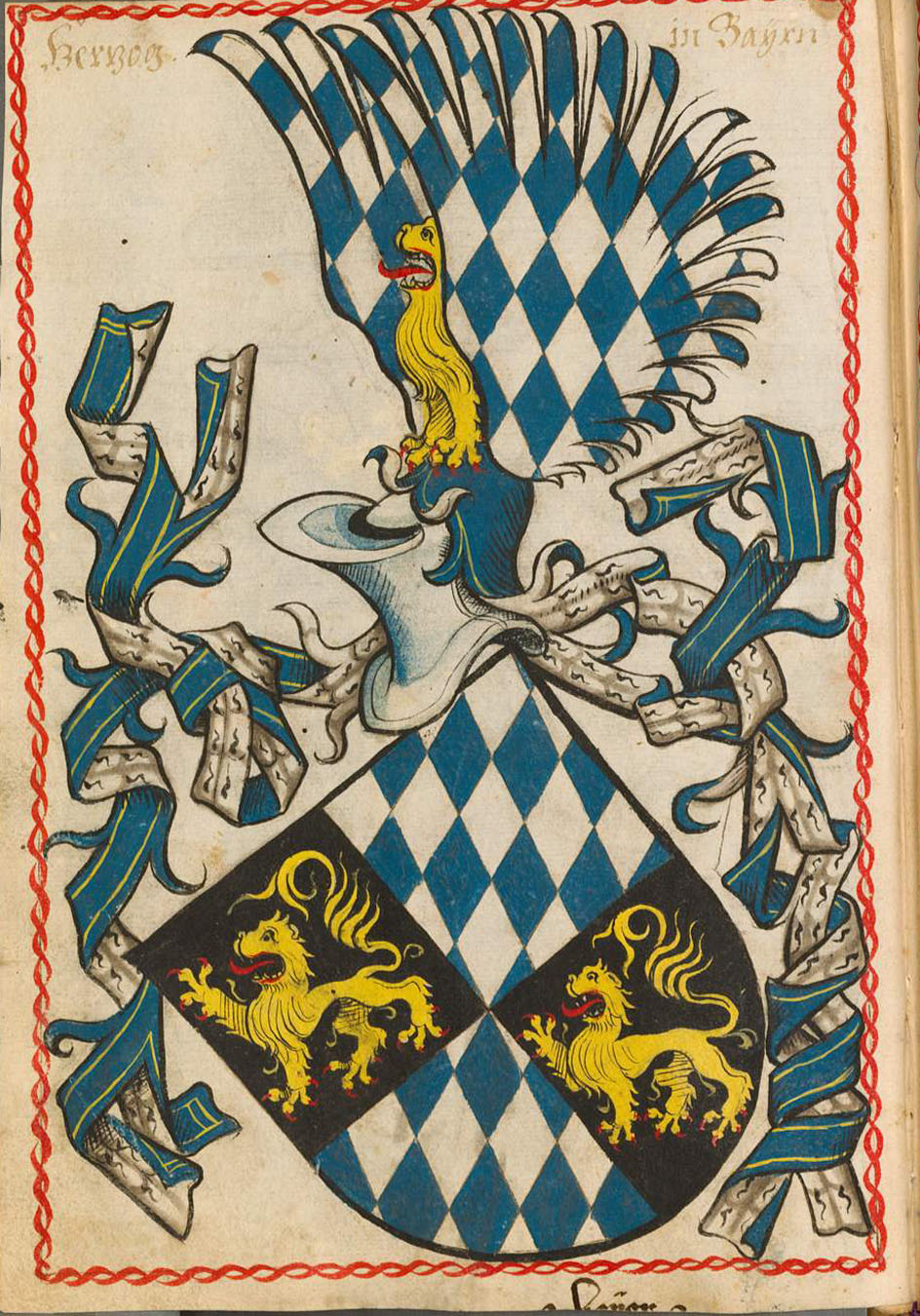 Scheibler'sches Wappenbuch , älterer Teil Herzog in Bayern